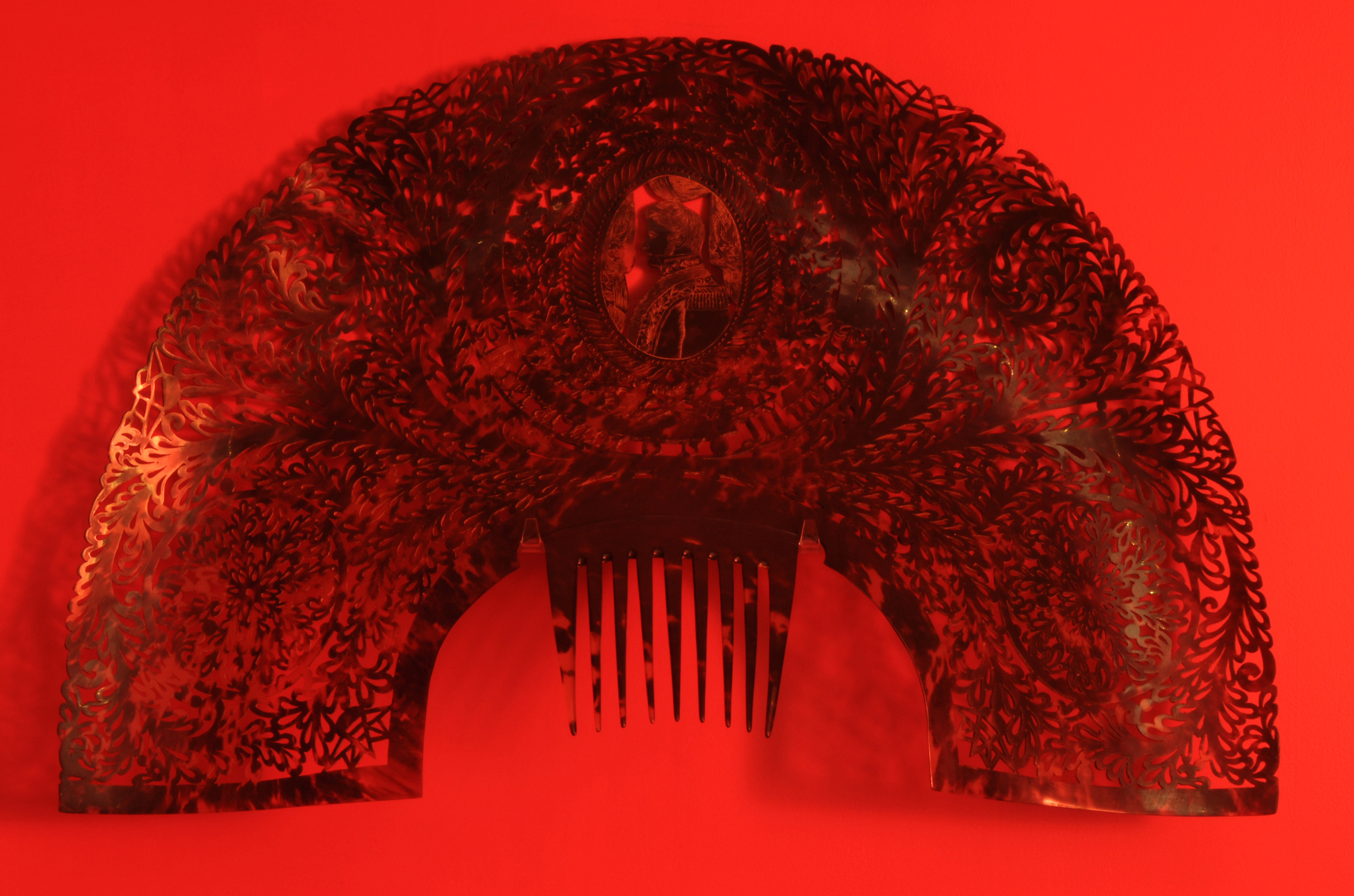 Anónimo, Peinetón de carey con la efigie de Juan Manuel de Rosas. 1832/1837. 40 x 117 cm (parte superior); 40 x 13 cm (peine), carey moldeado, calado y cincelado carey. Inv. 5058.